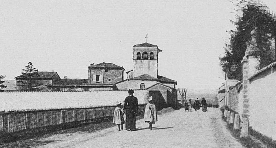 Dictionnaire illustré des communes du département du Rhône. Tome 1 / par MM. E. de Rolland et D. Clouzet.